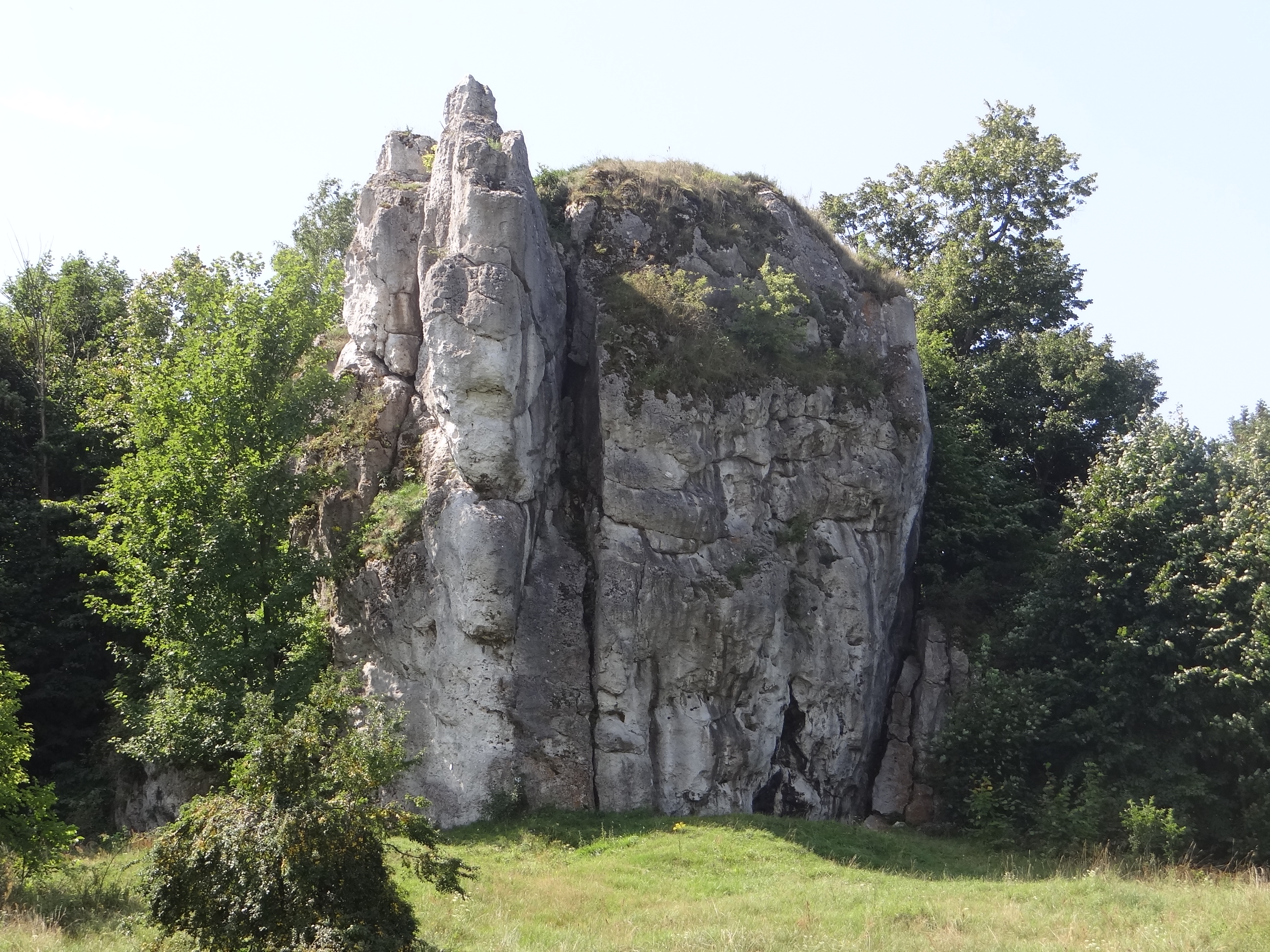 Skała Zamkowa w Łutowcu